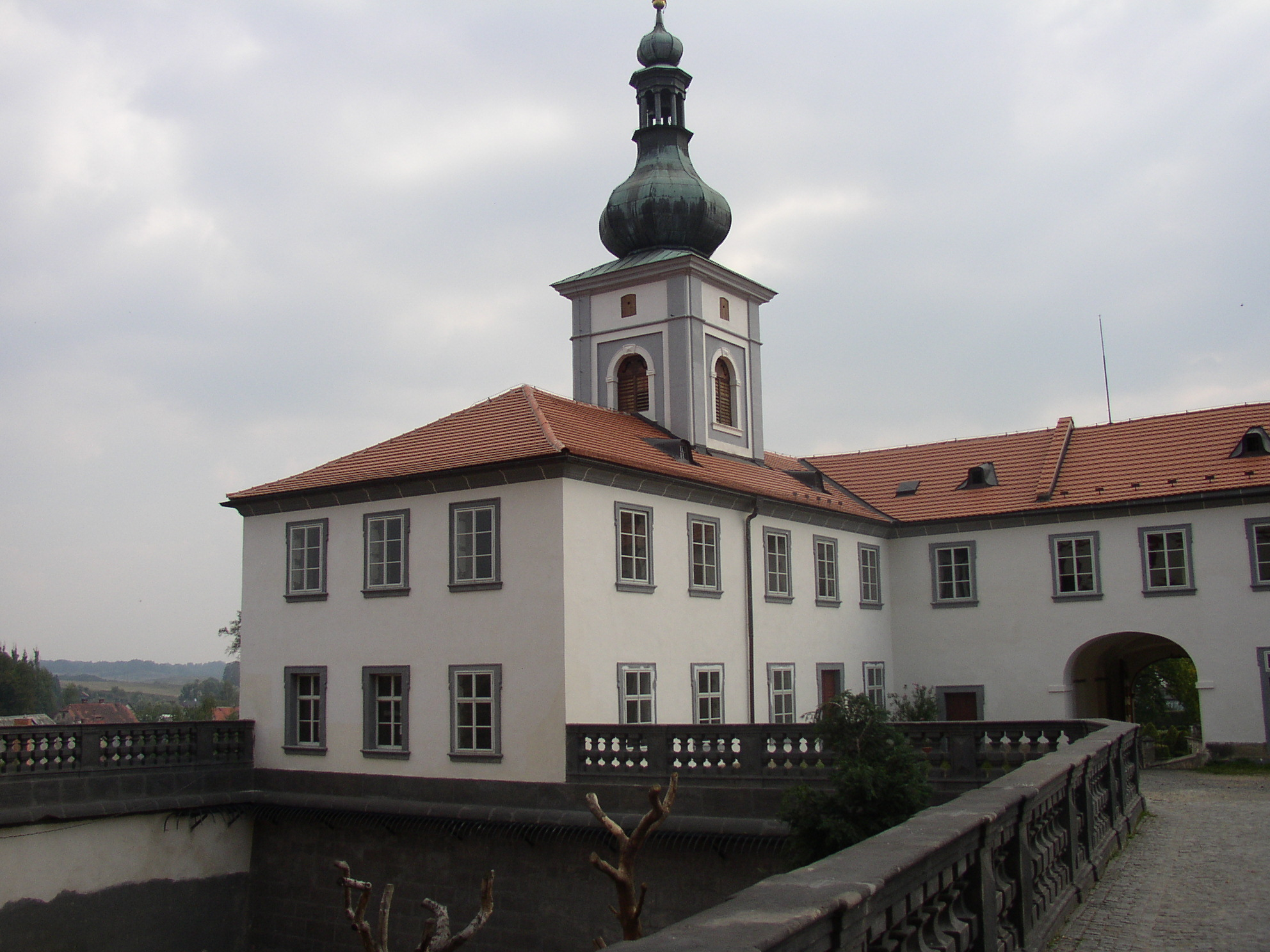 Zámek v Zákupech, Česká republika